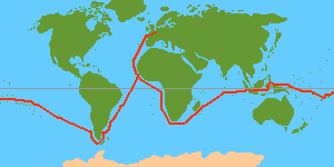 journey of Jakob Roggeveen 1721 - 1723